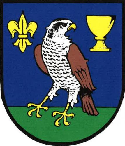 znak, Jestřabí Lhota, okres Kolín